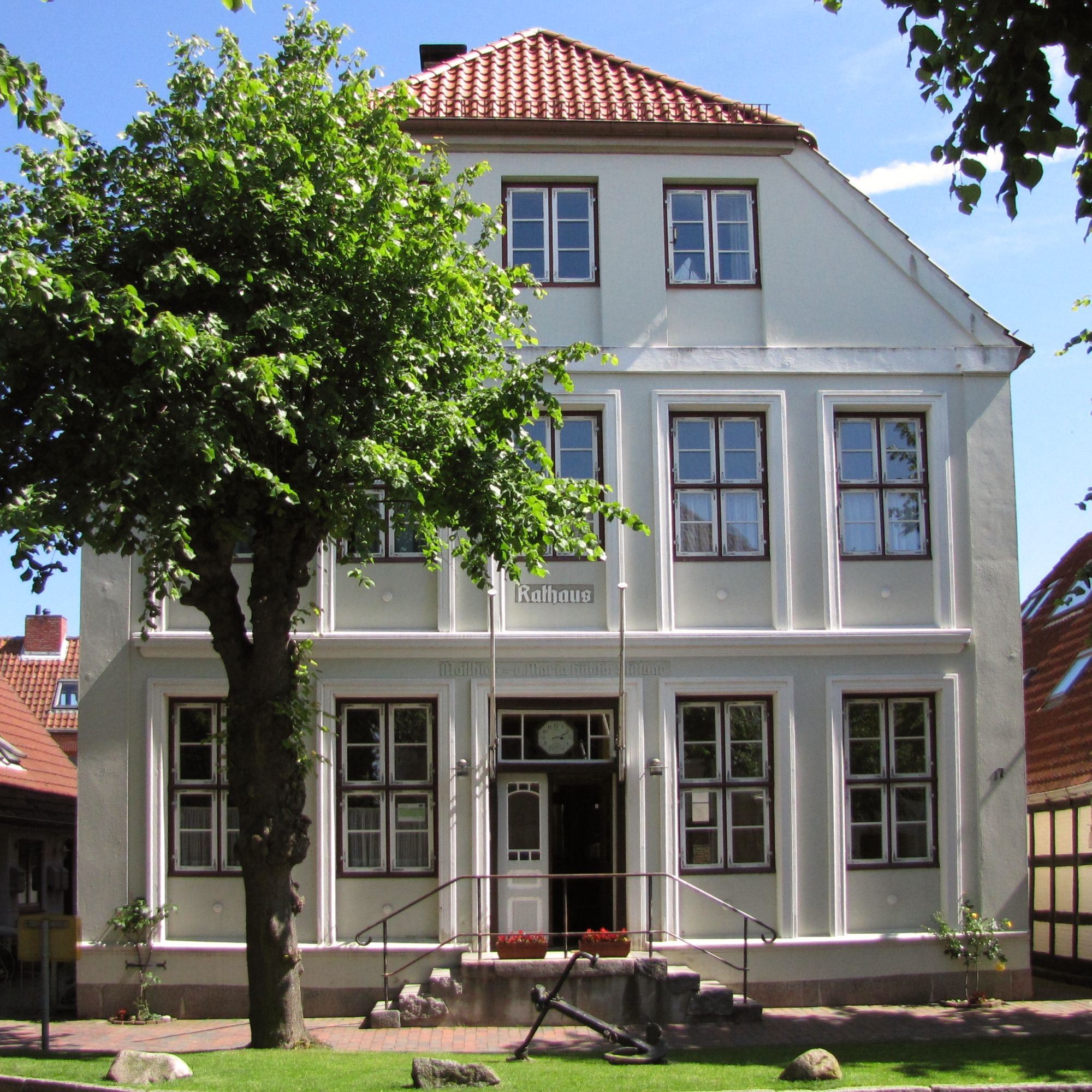 Das alte Rathaus der Stadt Arnis an der Schlei in Schleswig-Holstein, zugunsten der Stadt von der Matthias und Maria Hübsch Stiftung - Foto Wolfgang Pehlemann IMG_8739